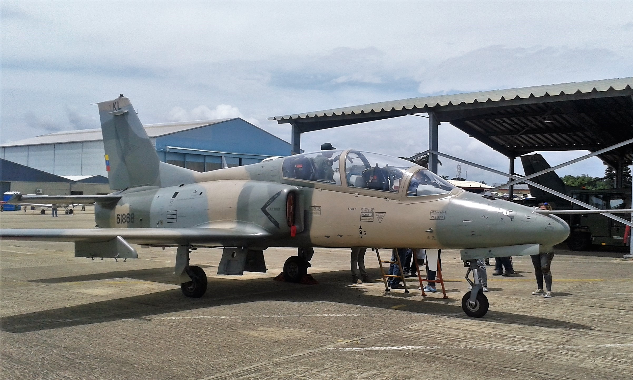 del Hongdu K-8W Karakorum AMBV desplegado en Expo Feria Aeronáutica "BALANDA 2016"